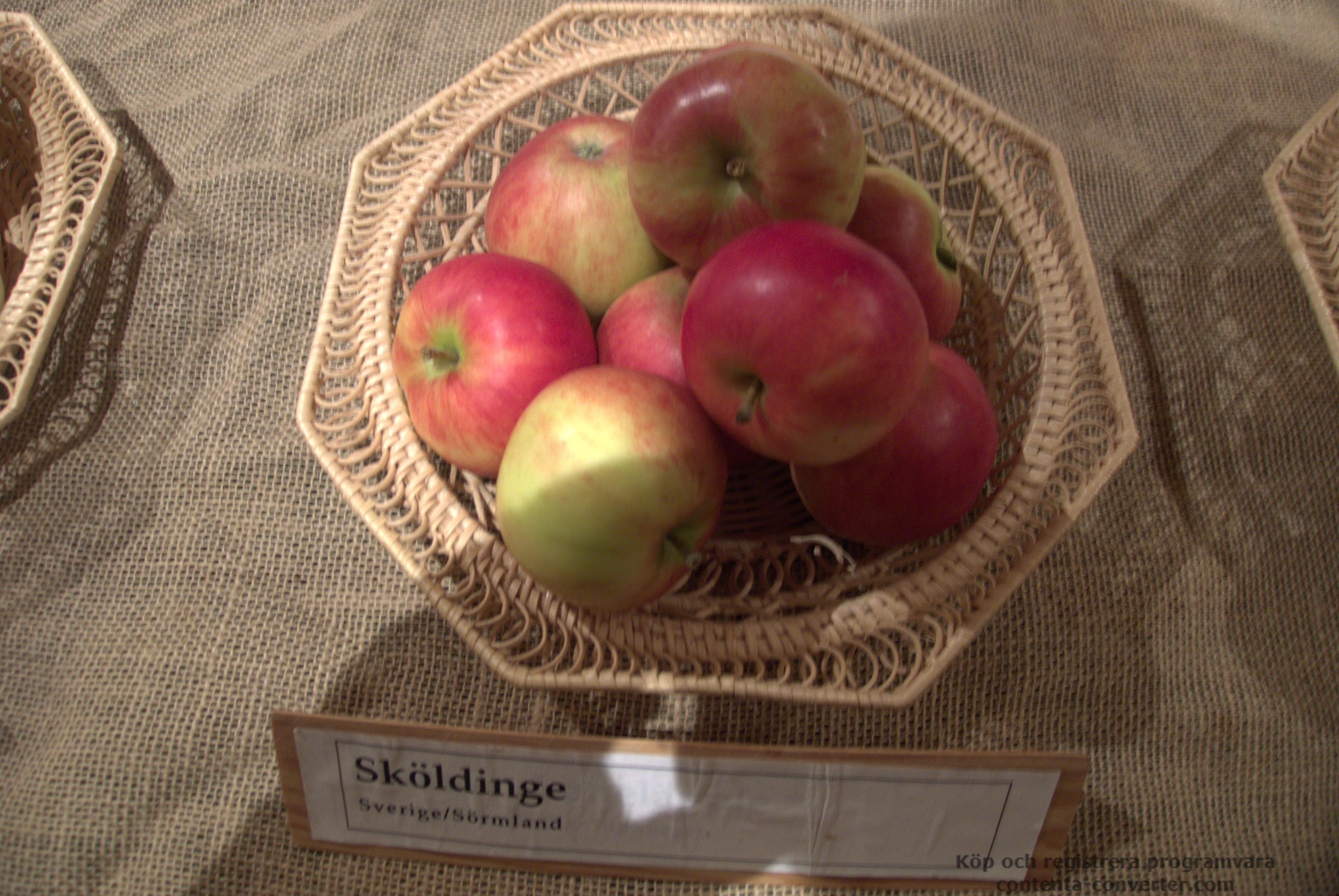 Äpplen av sorten Sköldinge